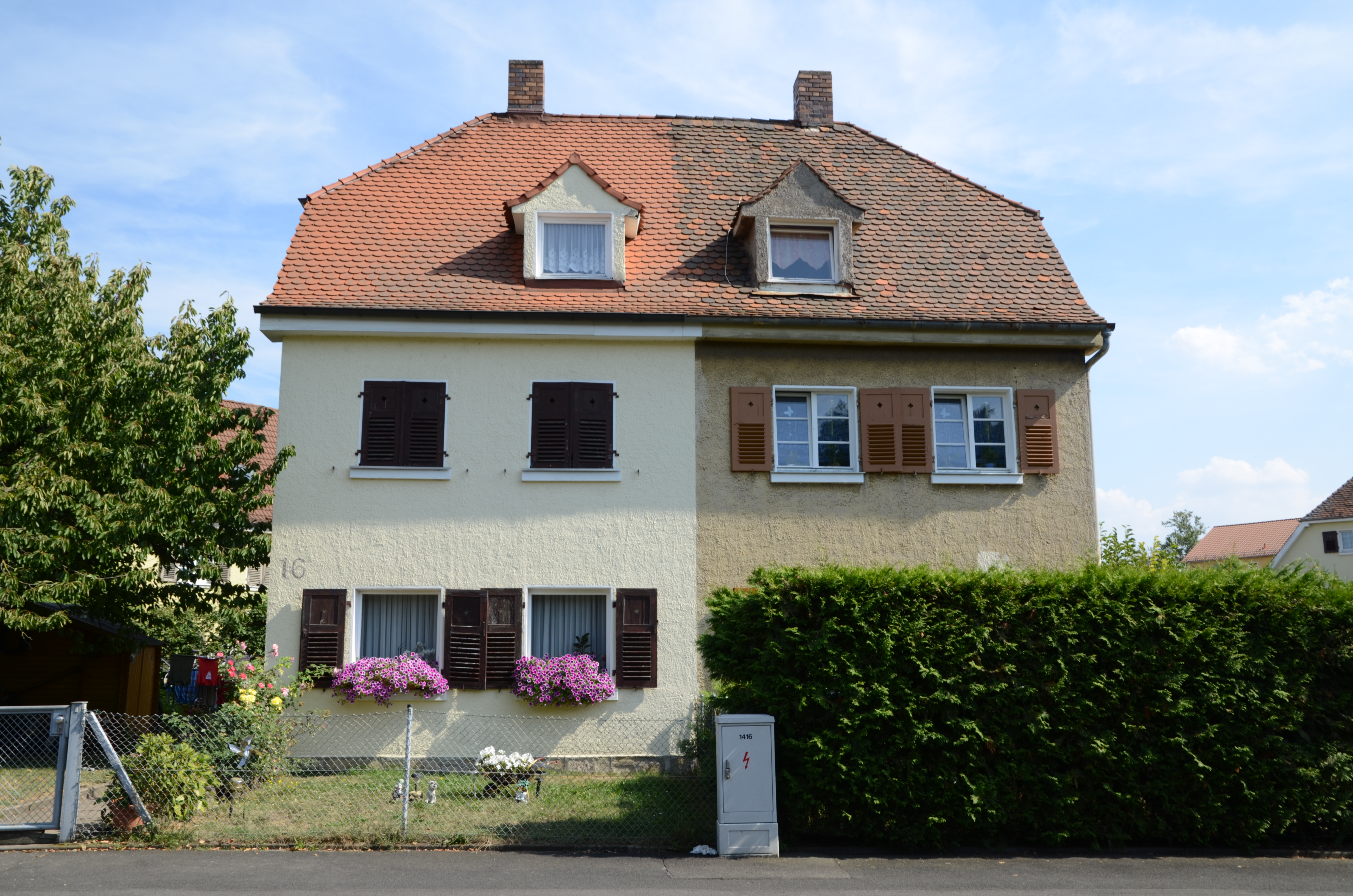 Schweinfurt Sachskolonie Wilhelm Höpflinger Straße 16 und 14